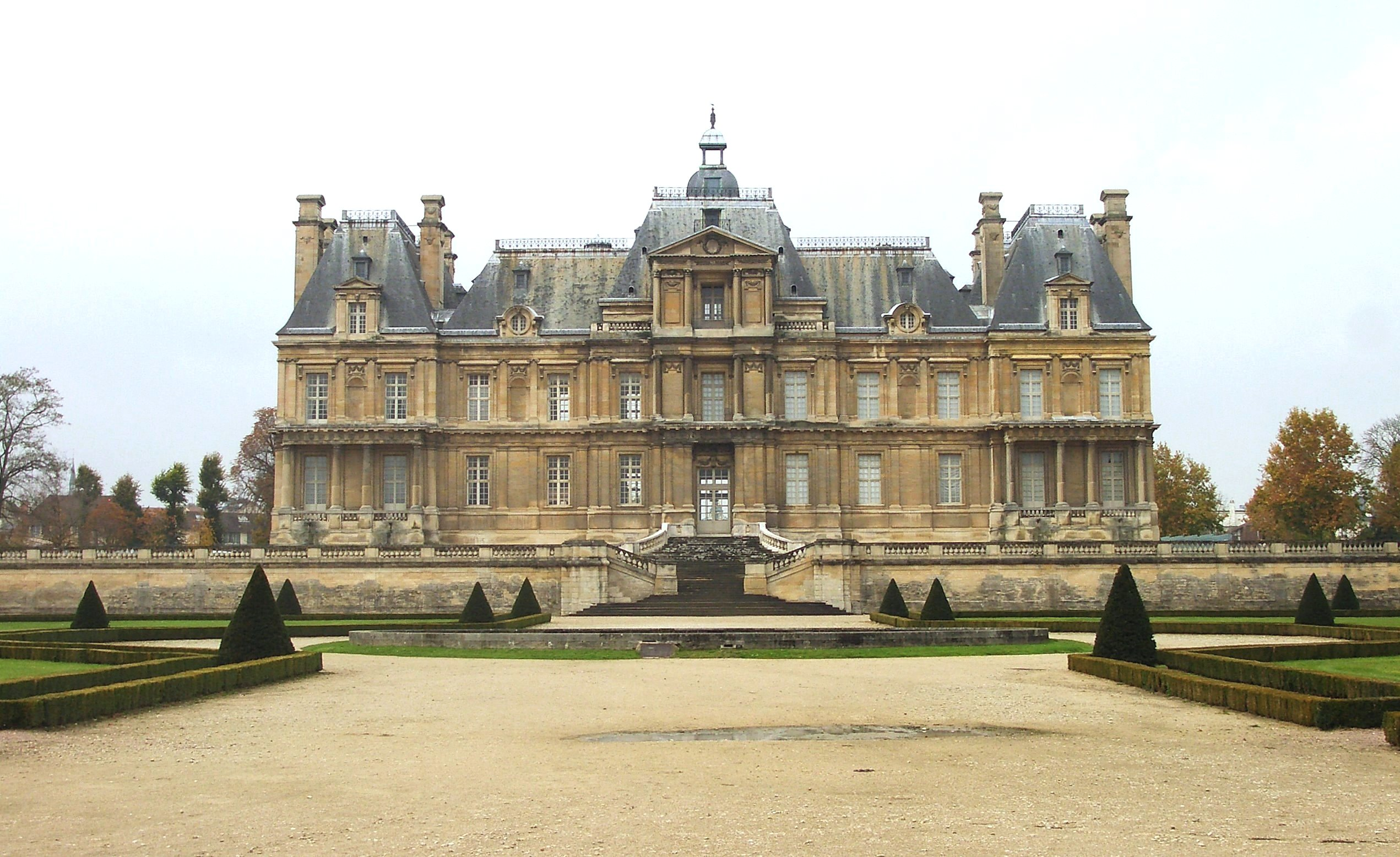 Le Château de Maisons-Laffitte à Maisons-Laffitte (aux Yvelines, dans la région parisienne).